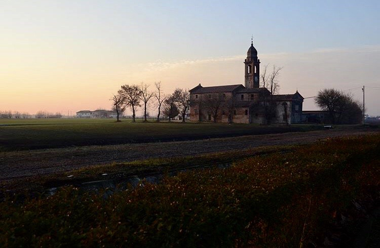 La chiesa al tramonto